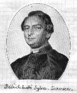 Bedřich hrabě Silva-Tarouca